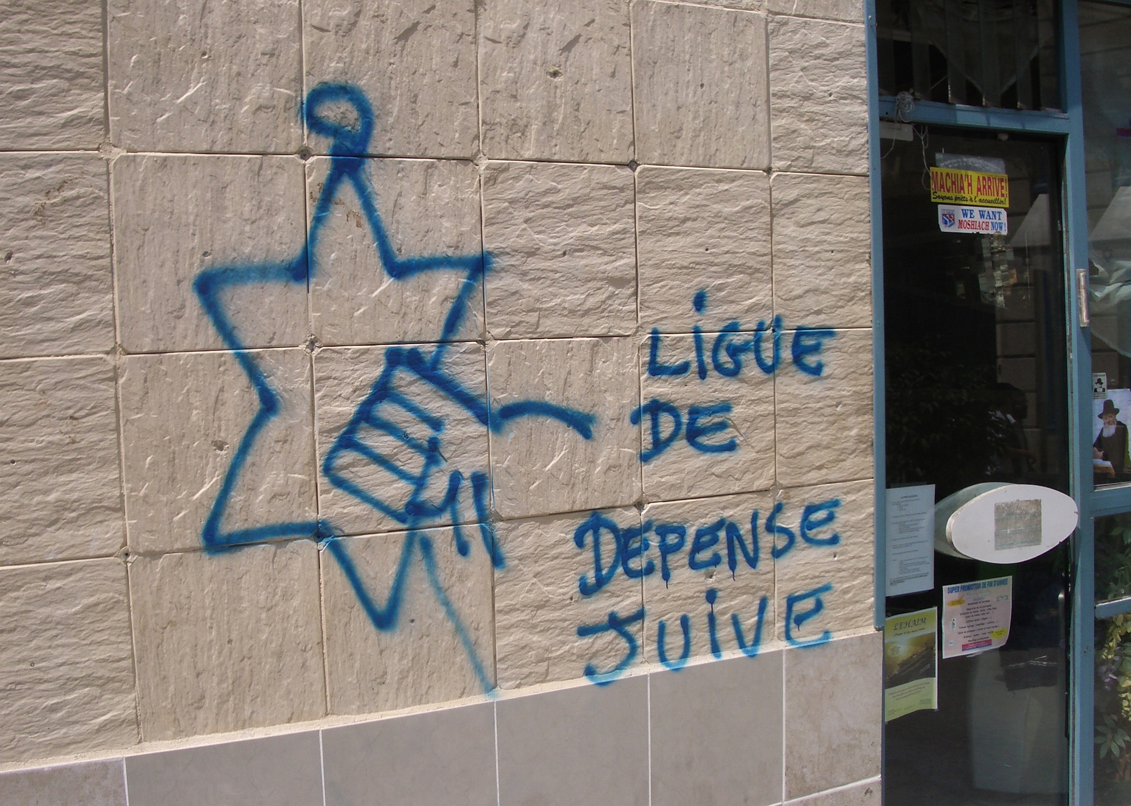 Un tag vu dans le quartier parisien du marais 14 juillet 2006, peu après le déclenchement d'hostilités entre israel et le liban.